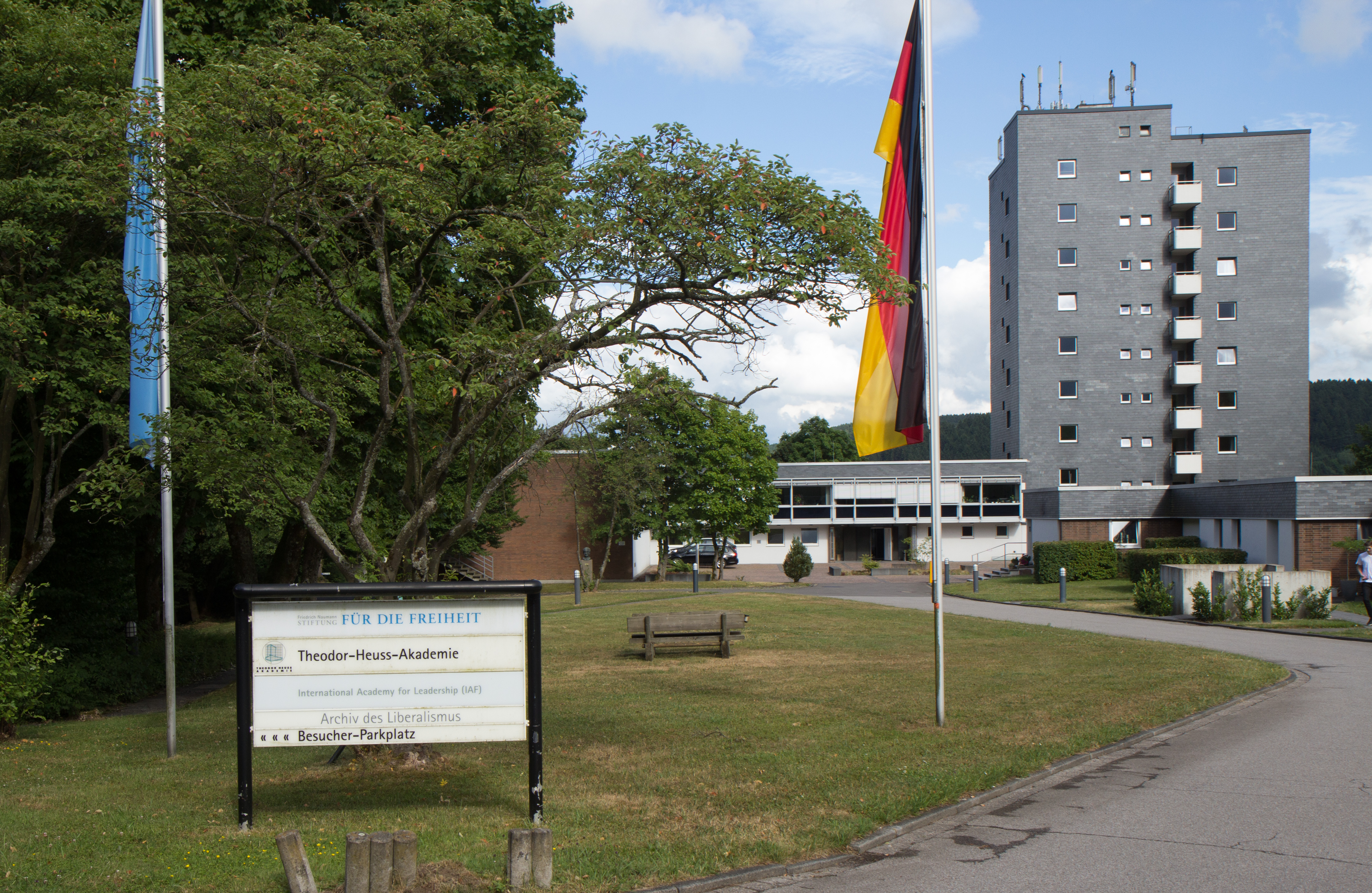 Theodor-Heuss-Akademie in Gummersbach: Außenansicht und Zufahrtsbereich (Richtung Osten)